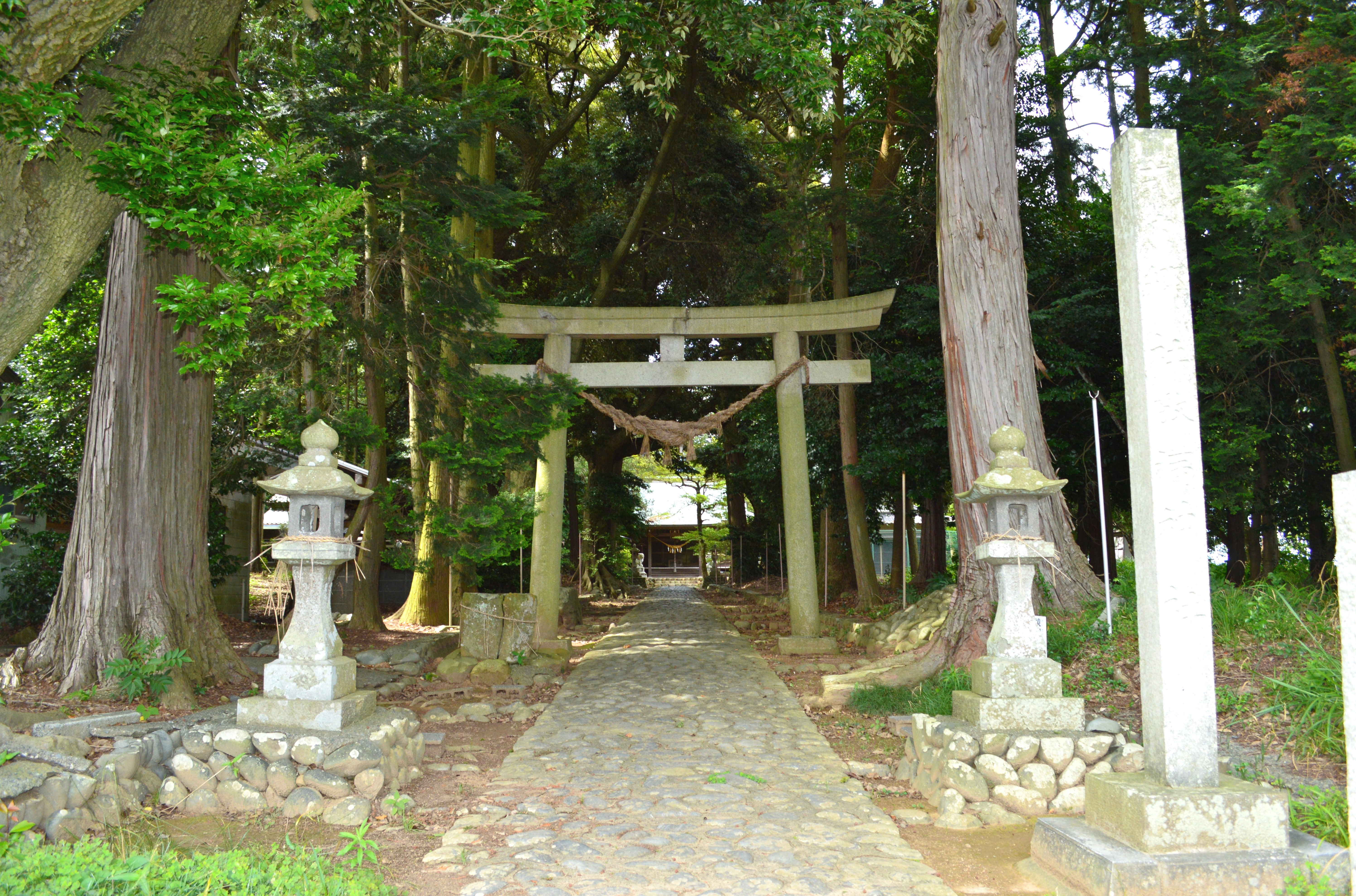 敬満神社 境内入口